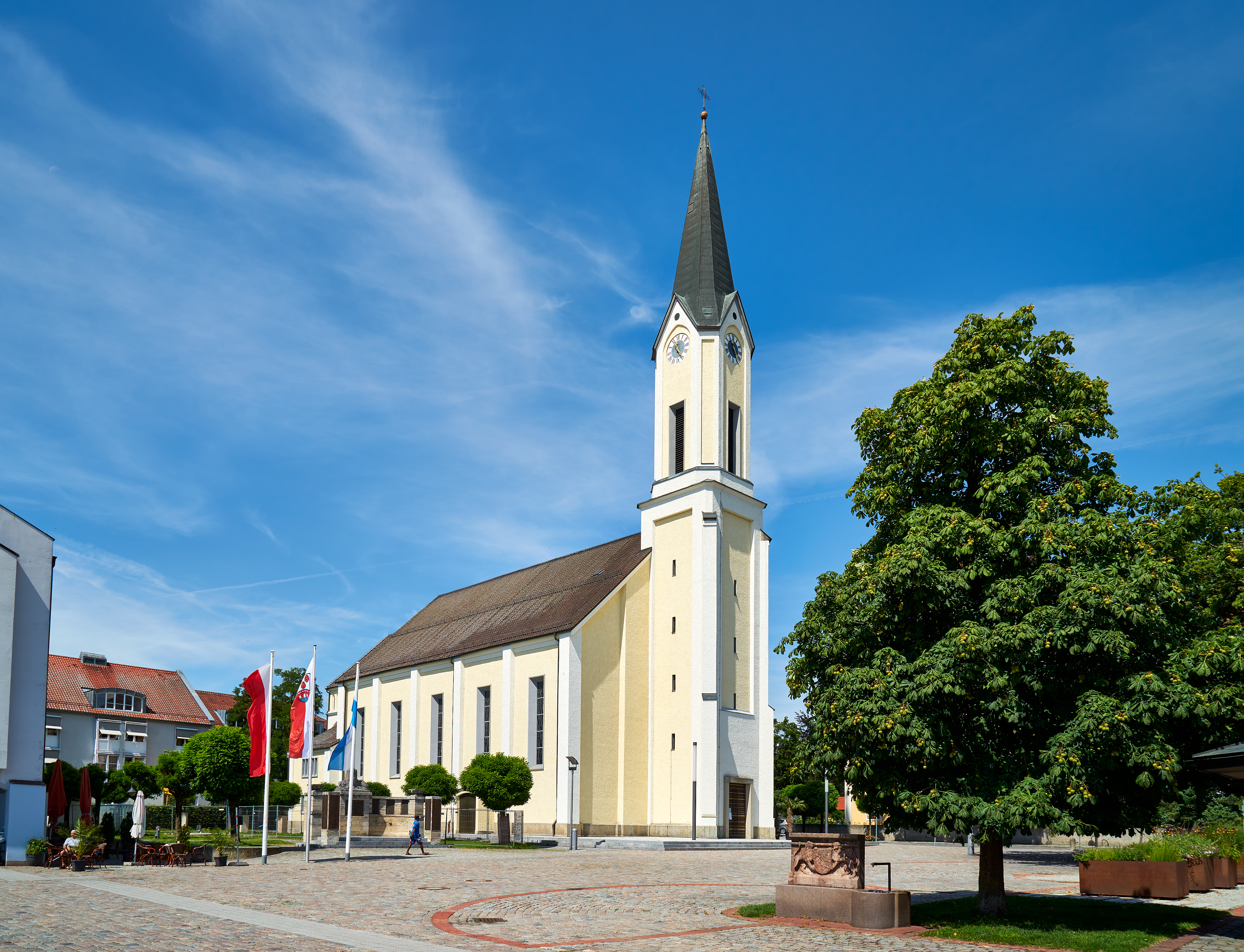 Katholische Pfarrkirche St. Mariä Empfängnis, neugotischer basilikaler Backsteinbau, 1859/63 erbaut von Architekt Leonhard Schmidtner, Landshut; Erweiterung und vereinfachender Umbau zur Saalkirche 1956; mit Ausstattung